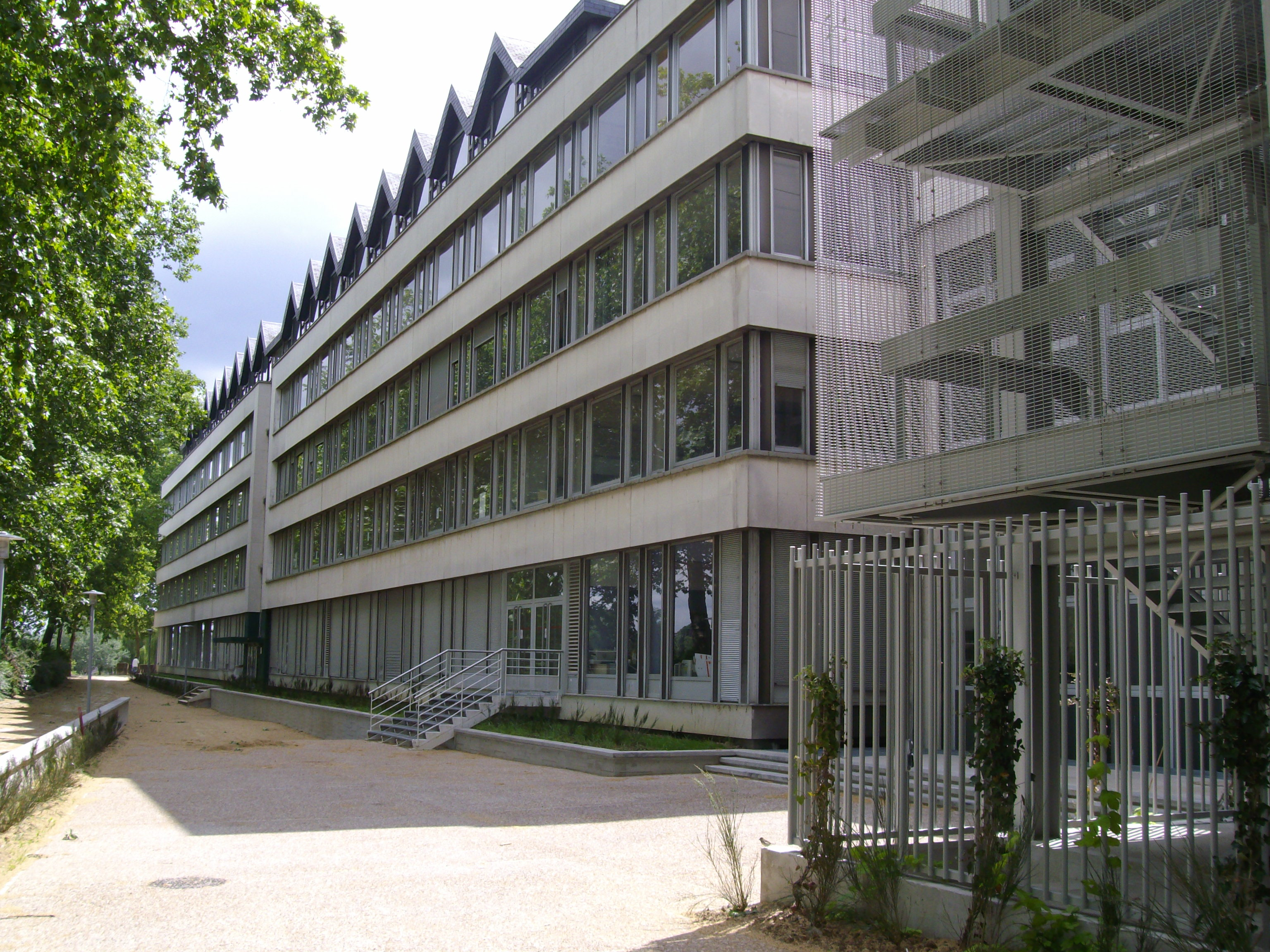 Le Bâtiment 1 du site des Tanneurs - Université de Tours.